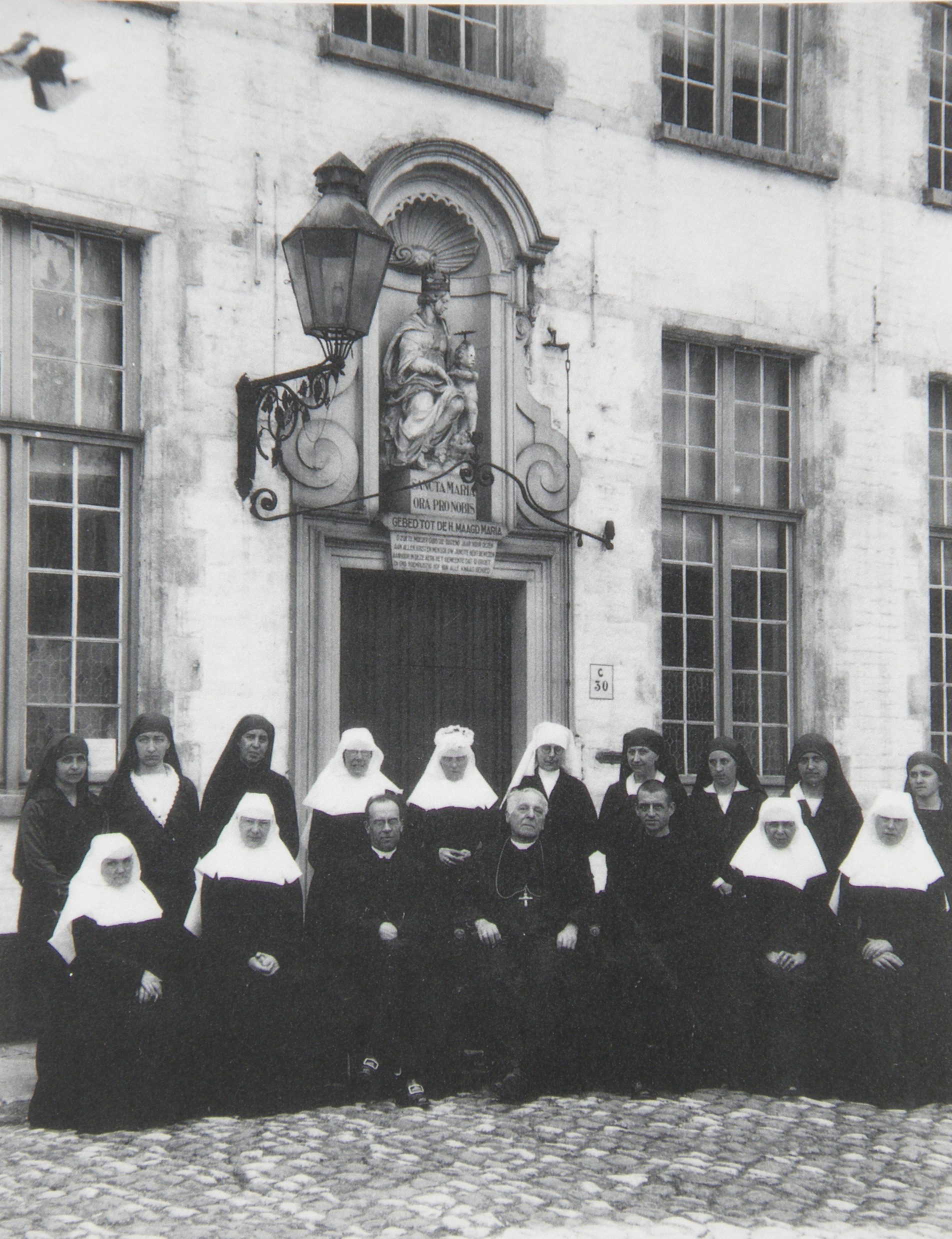 Réunion des béguines de Bruges et des Filles de saint Benoît de Nîmes, rassemblées autour de trois prélats (Don Gaspar Lefebvre à gauche, Rodolphe Hoornaert à droite, et un prélat britannique au centre) devant la demeure de la grande-maîtresse (maison n°30), en vue de la création d'un nouveau couvent de bénédictines sur le site du béguinage de Bruges (1926). Photographie reproduite dans Het prinselijk begijnhof De Wijngaard in Brugge de Fernand Bonneure & Lieven Verstraete, éd. Lannoo, Tielt 1992.